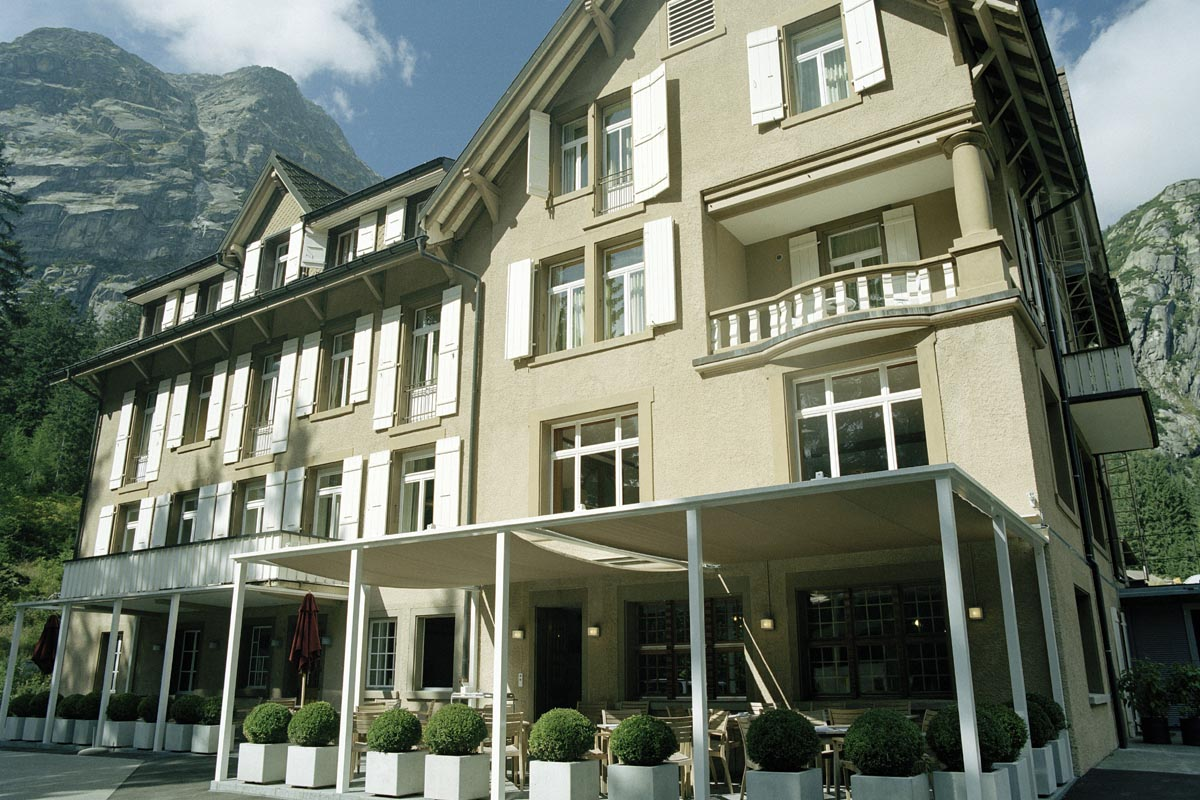 Kinder- und Familienhotel Handeck